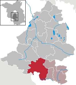 Niederer Fläming in Brandenburg (Country) - District Teltow-Fläming